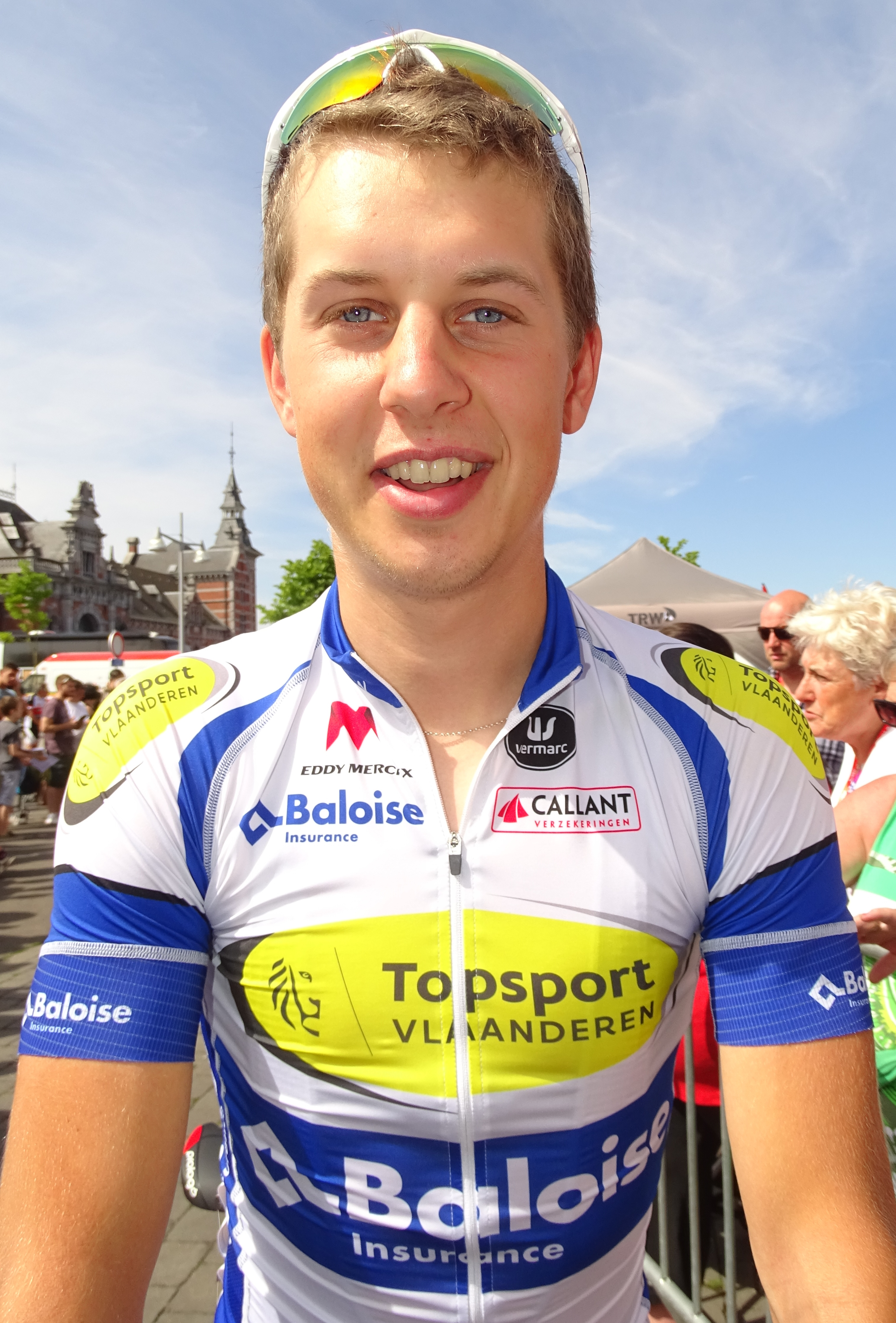 Reportage réalisé le mercredi 22 juillet à l'occasion du départ du Grand Prix Pino Cerami 2015 à Saint-Ghislain, Belgique.